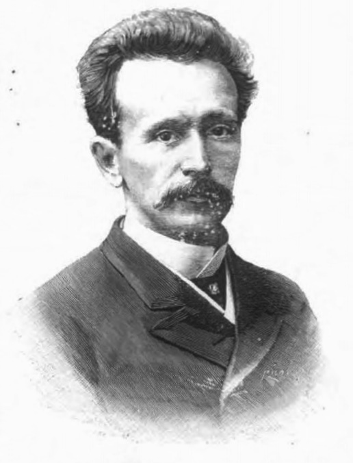 D. José Velarde.